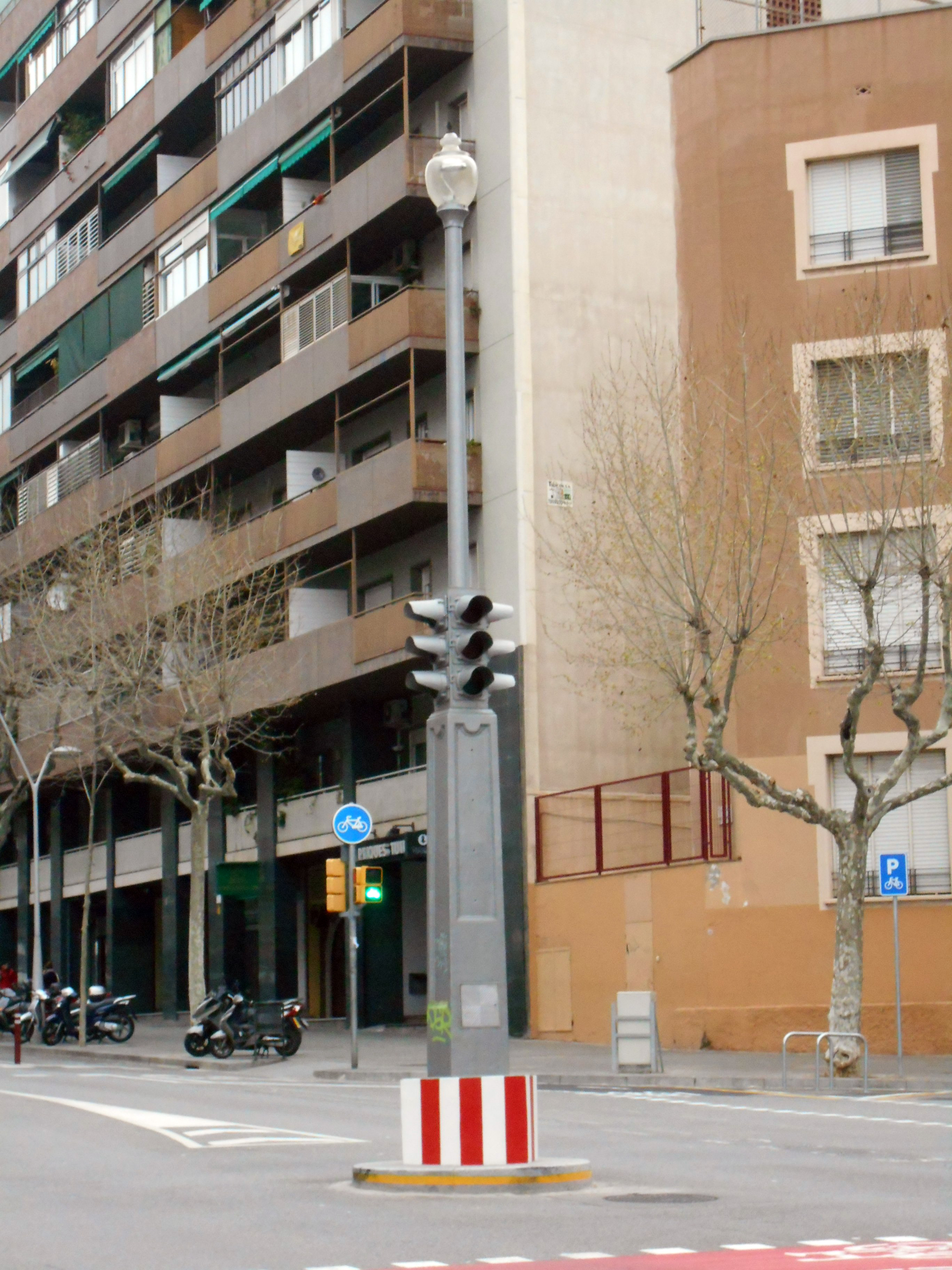 Semáforo a cuatro vientos del cruce de las calles Conde de Urgel/Londres, Barcelona.